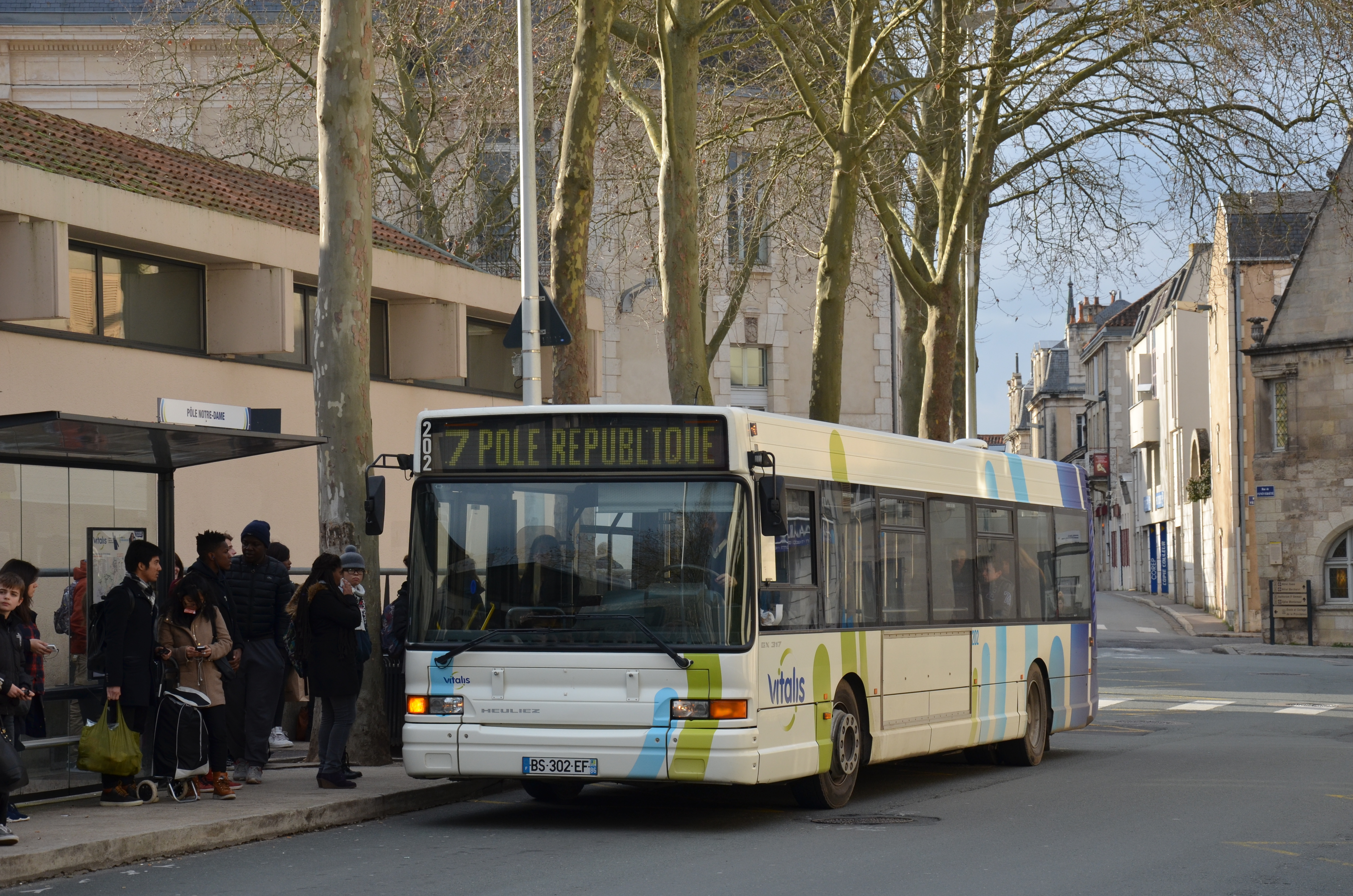 Heuliez GX 317 n°202 sur la ligne 7 du réseau Vitalis de Poitiers, à Pôle Notre-Dame.